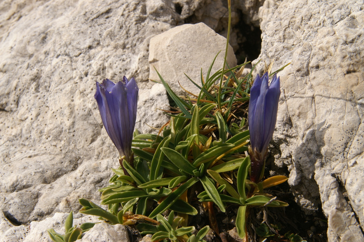 Froelichov svišč na Srebrnem sedlu - Planjava.